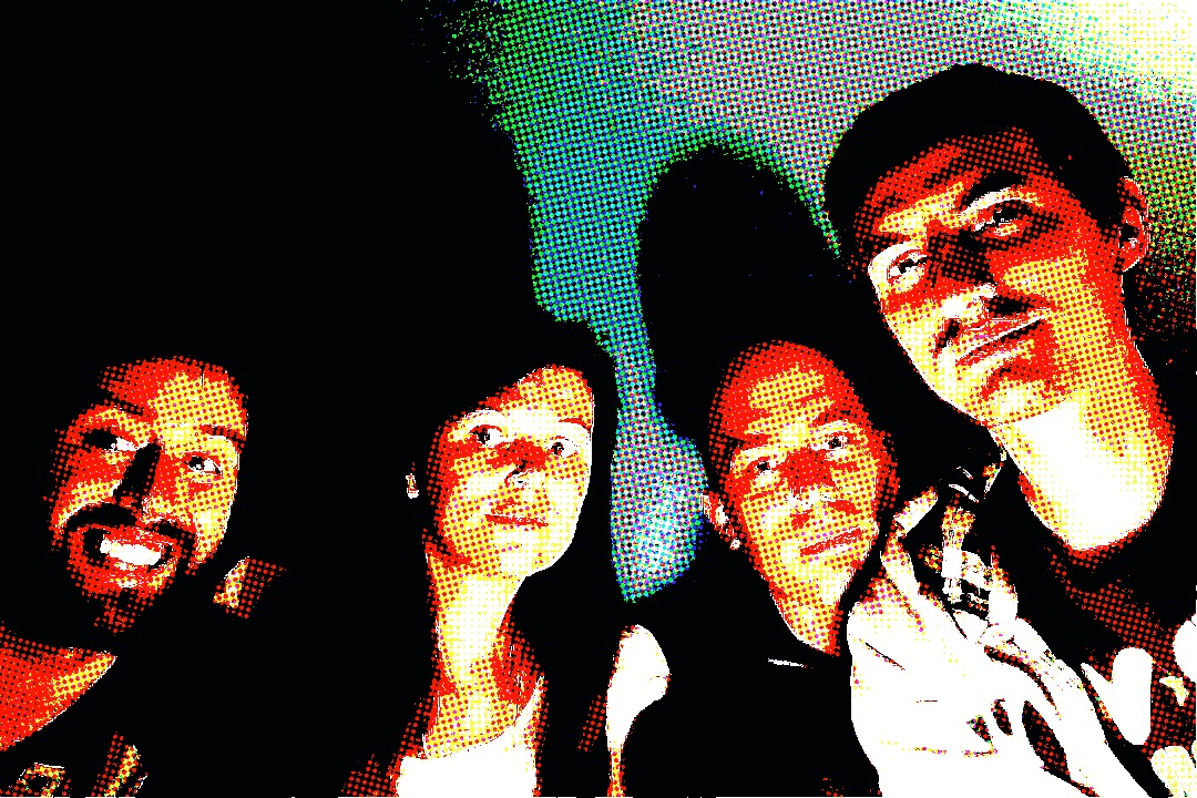 Photo du groupe prise lors du réunion de La Quadrature. On y retrouve Nicolas Rochette, Céline Jantet, Paul Bradley et Kevin Gravier.